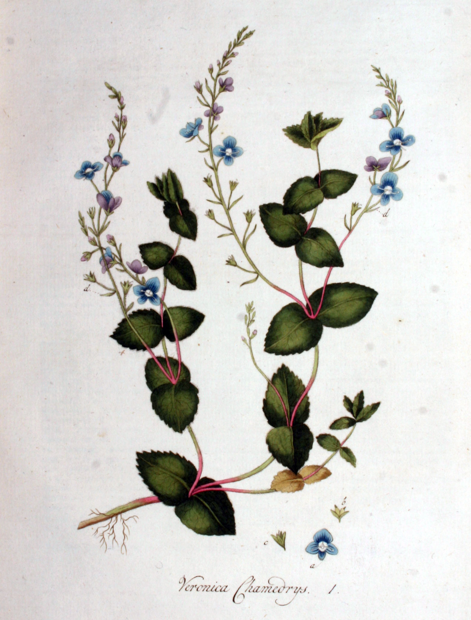 Veronica chamaedrys L.